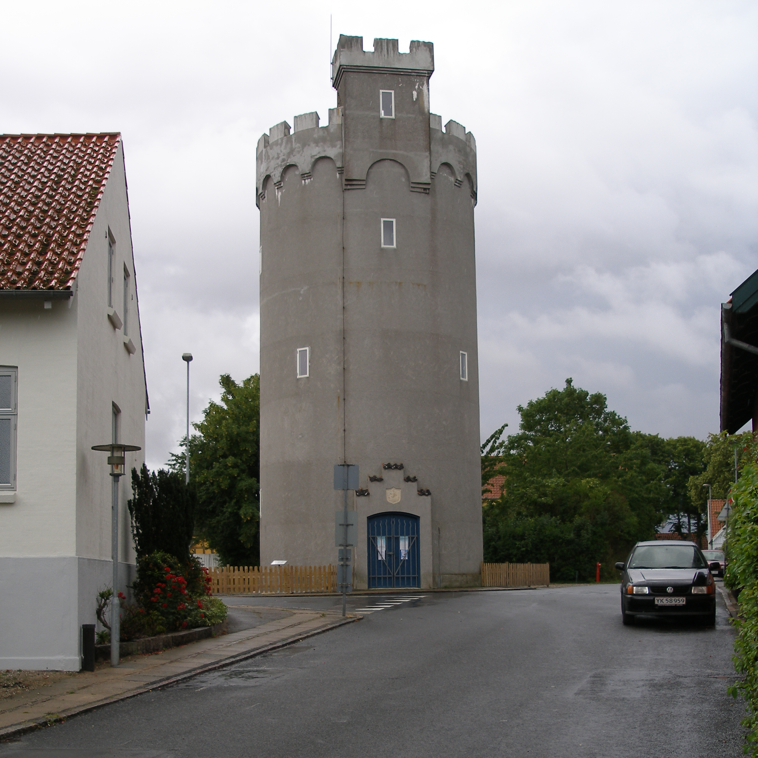 Bogense vandtårn